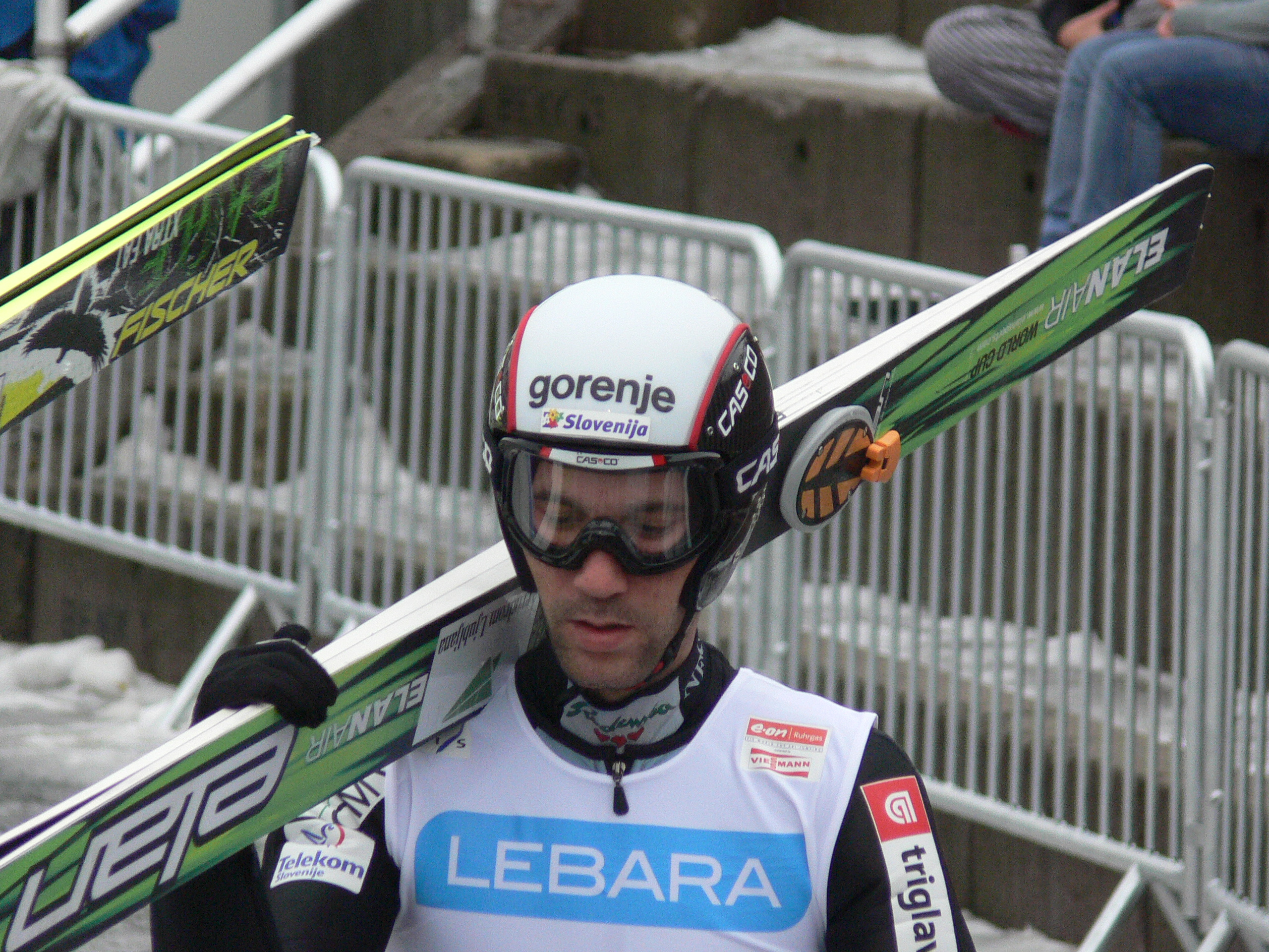 Primož Peterka, from the 2008 World Cup ski jumping event in Holmenkollen, Oslo.